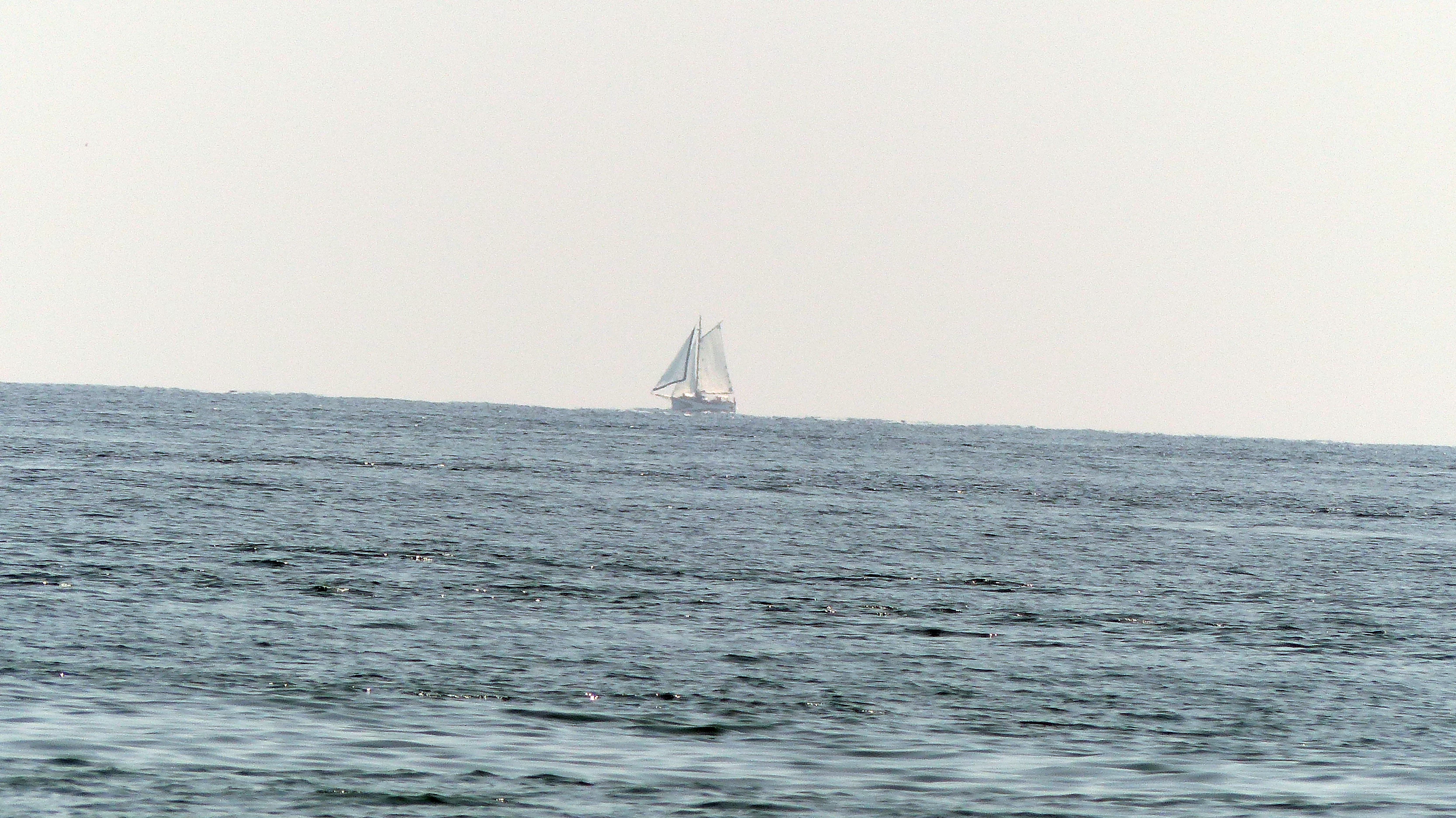 Velero en el Mediterráneo, visto desde la localidad de Casarones, en el municipio de Rubite (Granada, España)